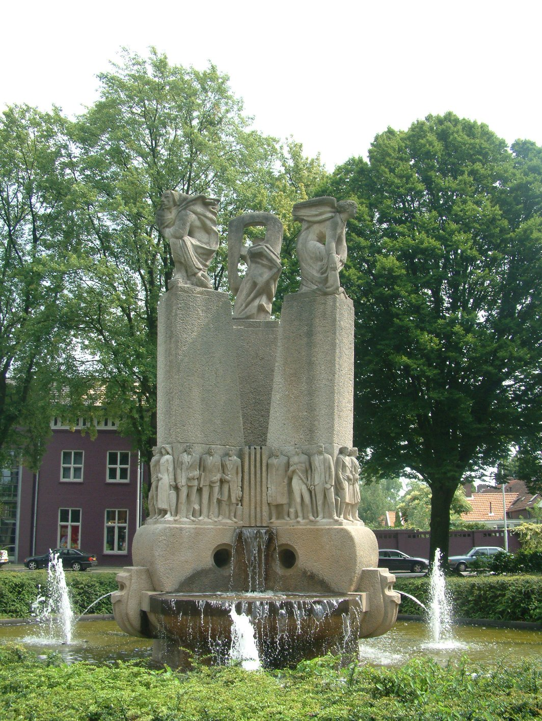 Panta Rhei, kunstwerk (en fontein) van Hubert van Lith met teksten van Victor E van Vriesland, op de hoek Kastanjelaan-Essenstraat-Frederiklaan in Eindhoven